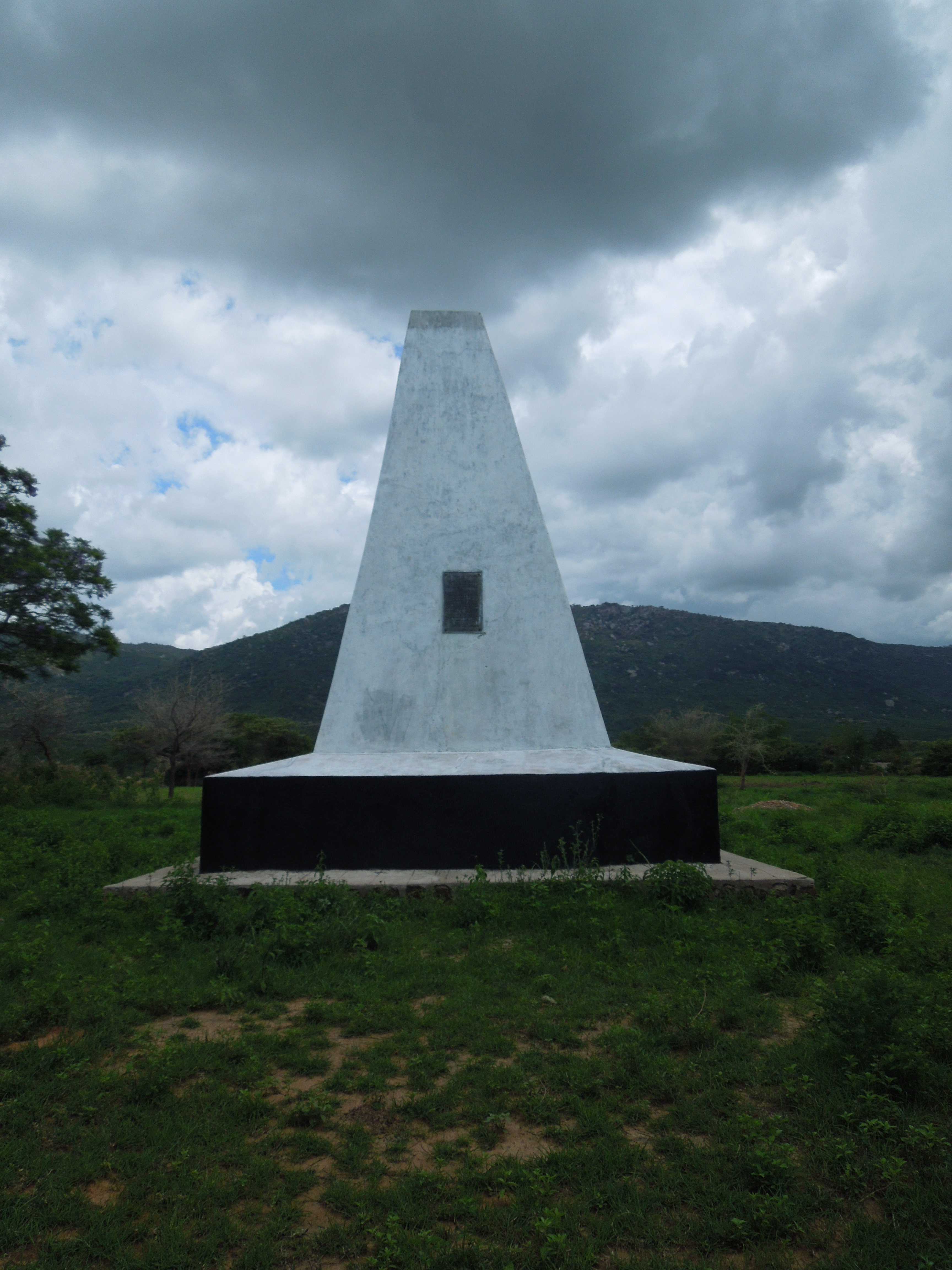 Denkmal für die 10 gefallenen Deutschen Angehörigen der Schutztruppe die hier in einen Hinterhalt der Wahehe Krieger gerieten,ebenso wurden 300 Askaris und 170 Träger im Kampf getötet. Das Gefecht das 1 km vor dem heutigen Lugalo (21km vor Iringa an der heutigen Straße nach Dar es Salaam) stattfand war eine der größten Niederlagen Deutscher Kolonial Truppen in Ostafrika. Die Wahehe Krieger waren mit Pfeil und Bogen und mit Speer und Schild ausgerüstet,lediglich die Nachhut der Deutschen konnte entkommen.